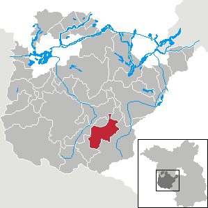 Mühlenfließ in Brandenburg (Country) - District Potsdam-Mittelmark